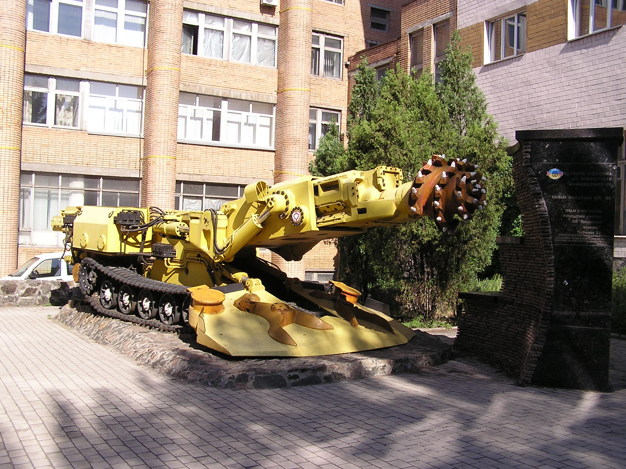 Комбайн проходческий КСП-32